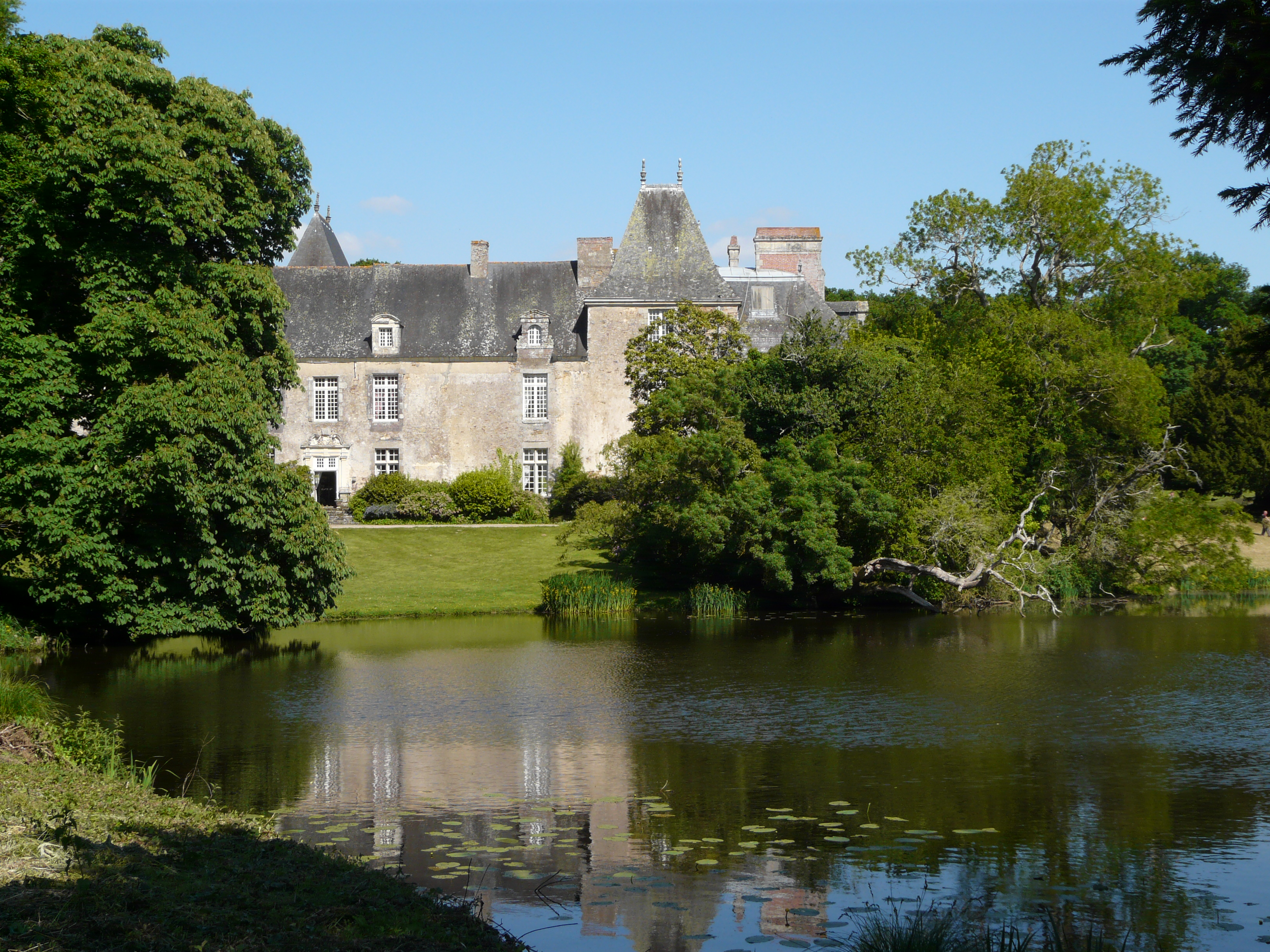 Le château du Pordor dans son parc (Avessac)